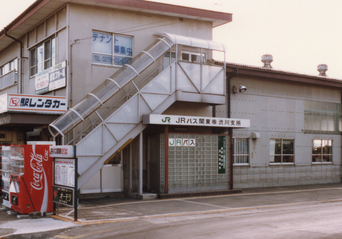 渋川支所